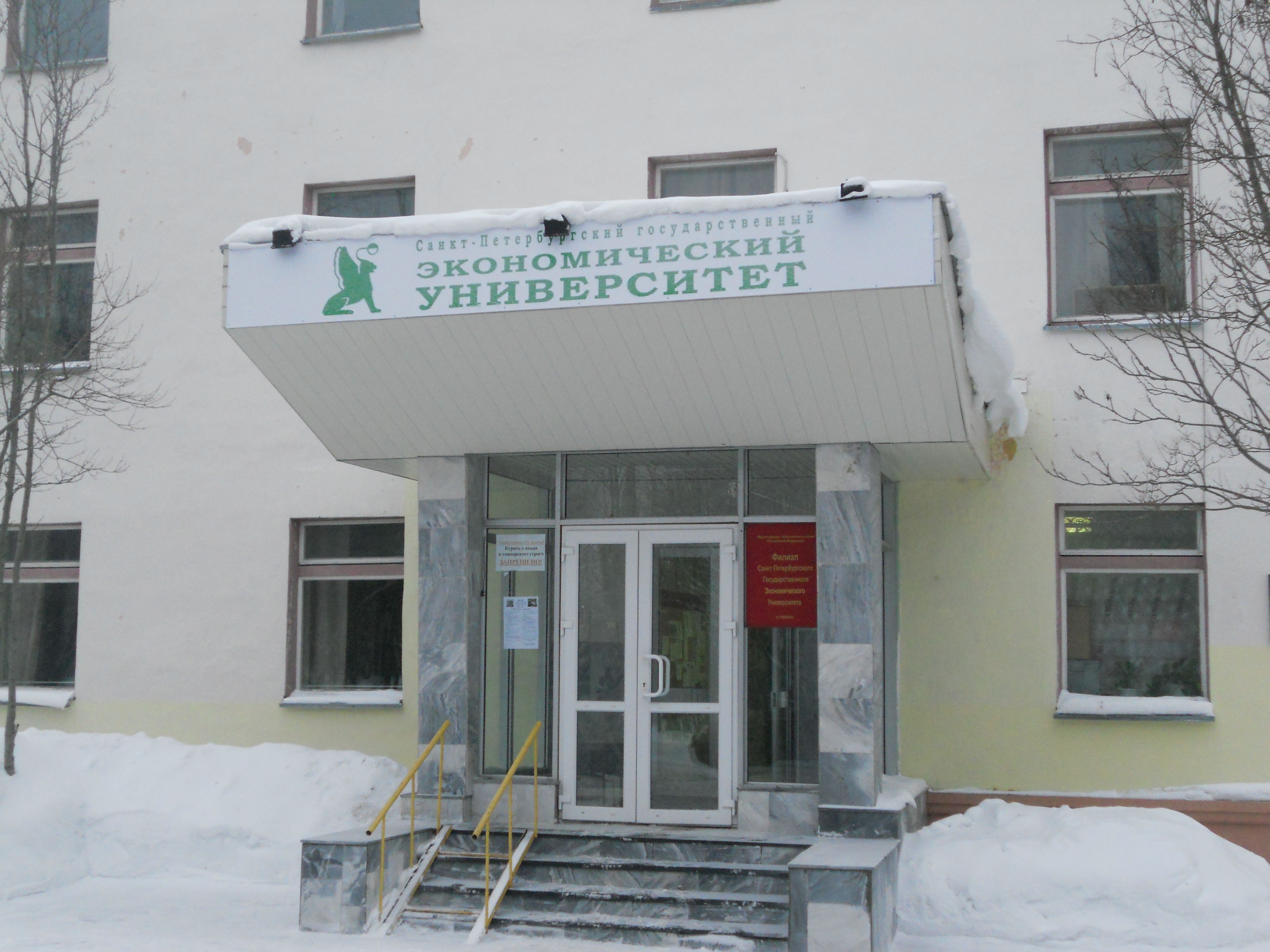 ИНЖЕКОН